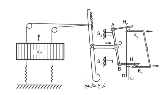 الدوبي ذو السكاكين، أحد أنواع جهاز الدوبي